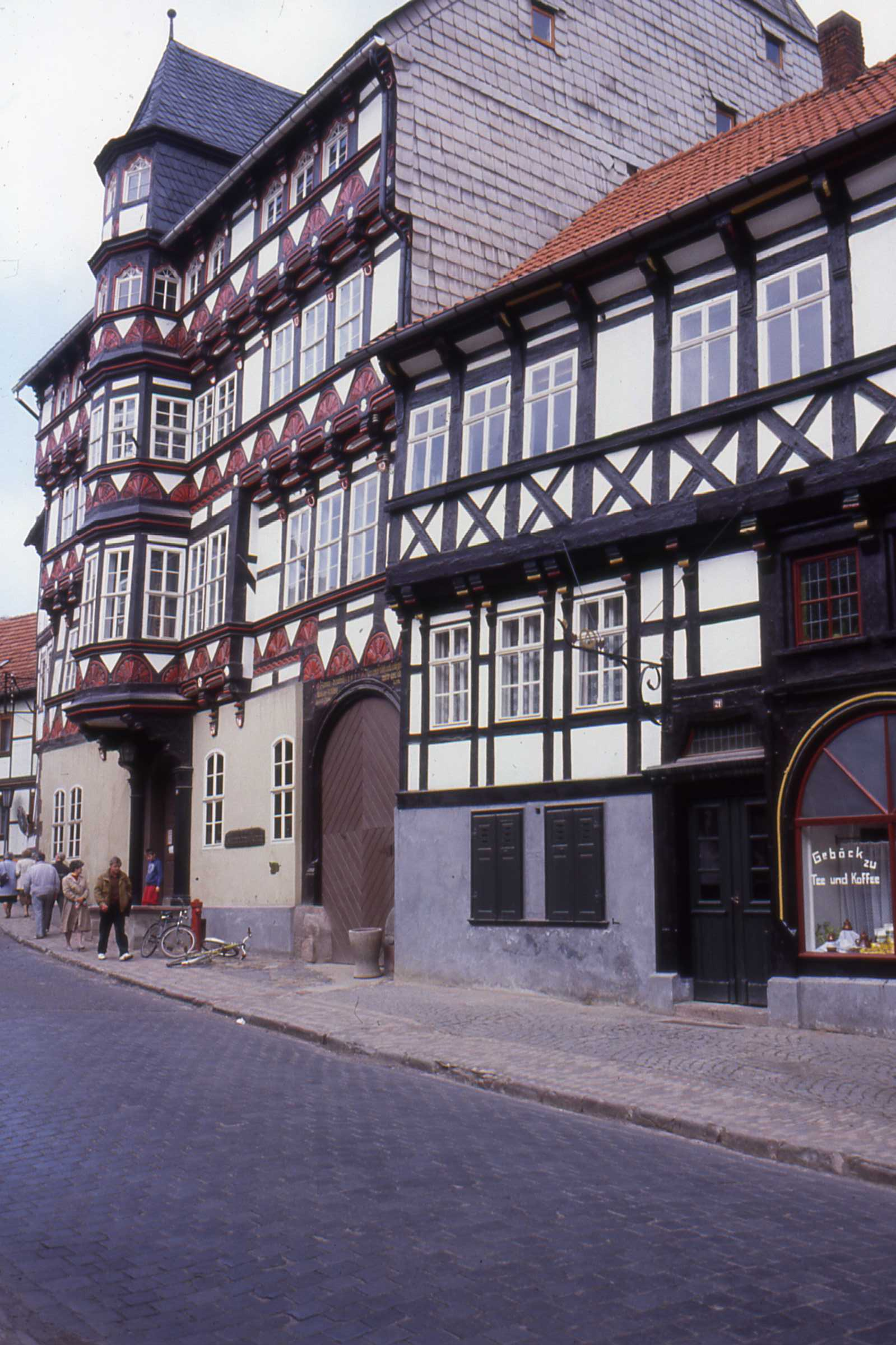 Fachwerkhäuser Stolberg, Harz, DDR Apr 1990